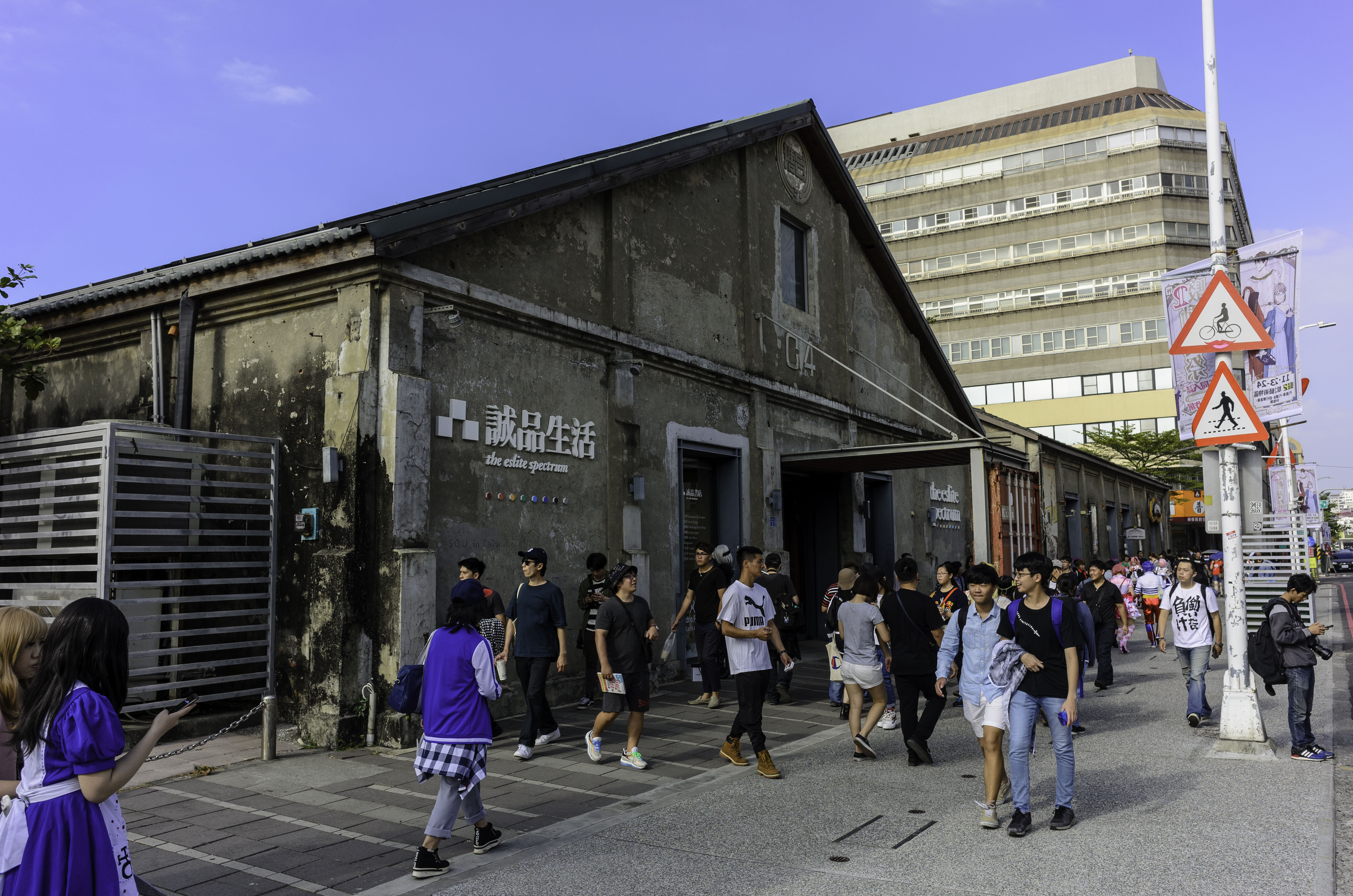 誠品生活駁二店，地址：高雄市鹽埕區大勇路3號（駁二藝術特區C4倉庫）。